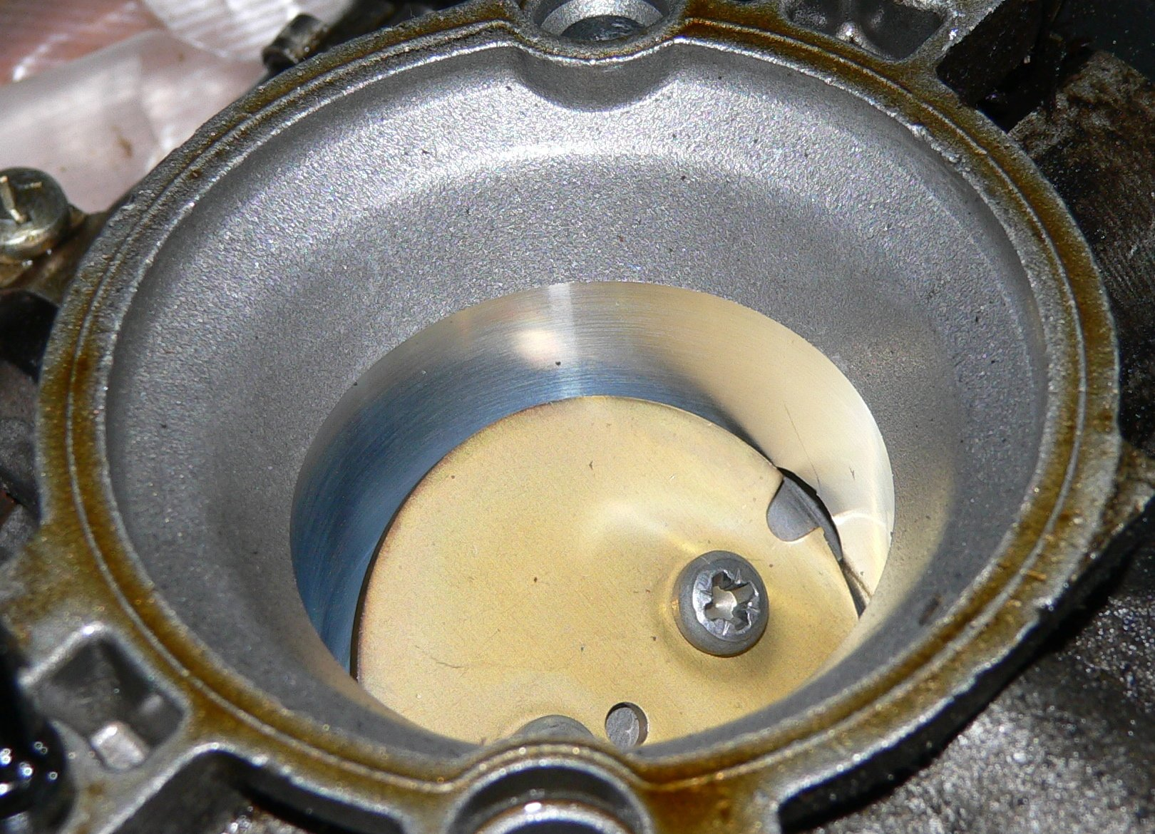 Drosselklappe eines Ottomotors, selbst fotografiert Throttle valve of an Otto engine